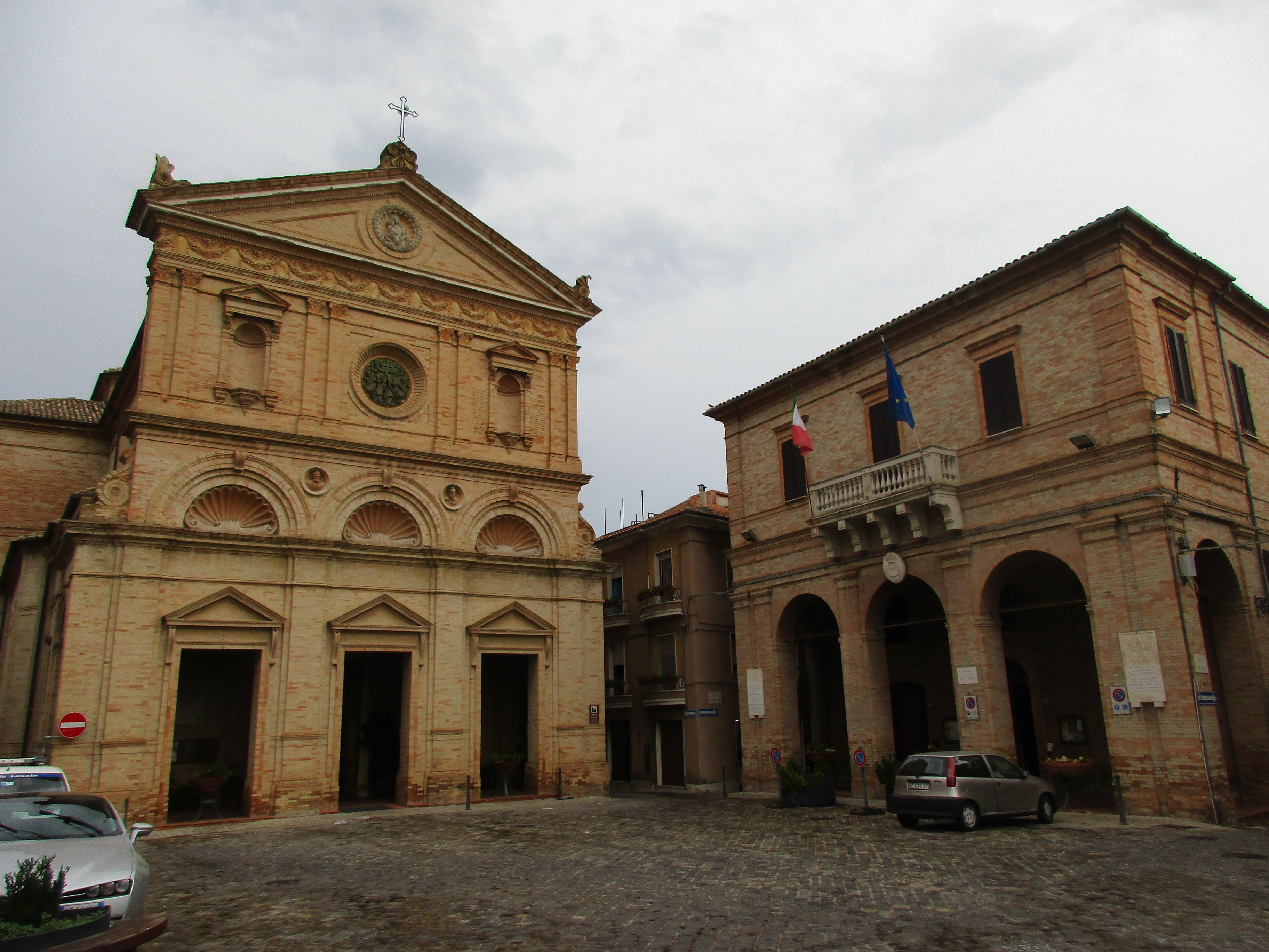 Monte Urano - Chiesa di San Michele Arcangelo e Municipio